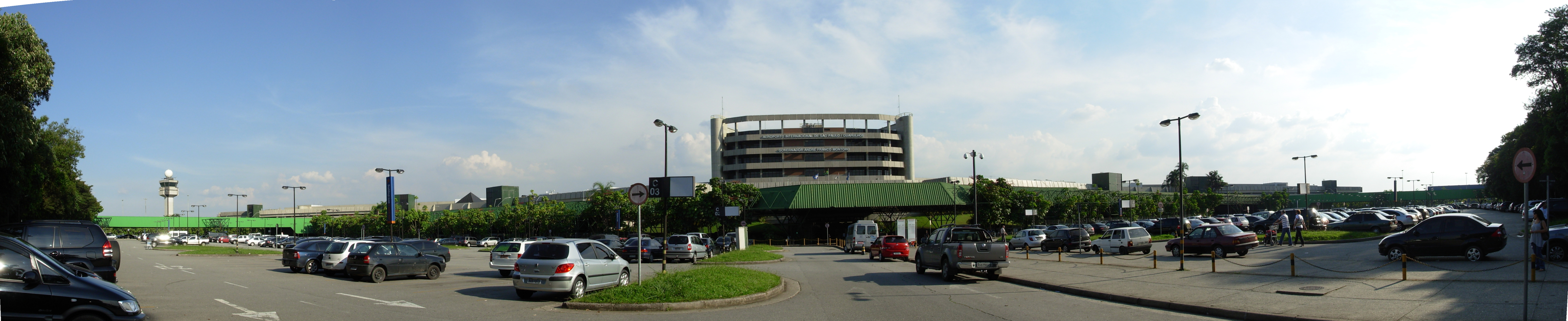 Panorama do Aeroporto Internacional de São Paulo/Guarulhos, Governador André Franco Montoro